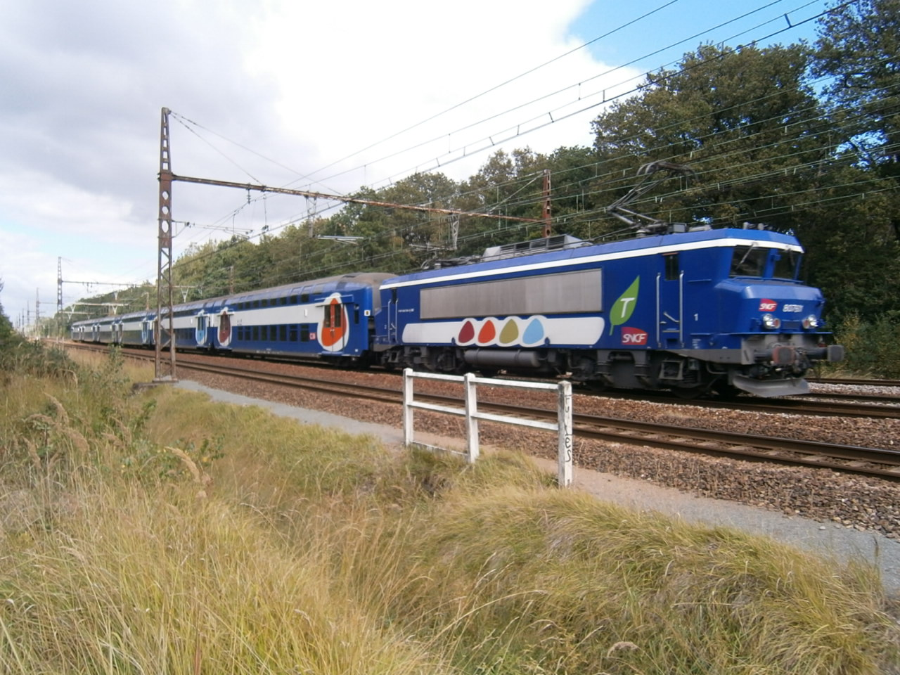 Une BB 7600 et ses VB 2N roule sur la ligne de Paris-Montparnasse à Brest, au Perray-en-Yvelines (78). Elle assure une mission Transilien N, de Rambouillet à Paris-Montparnasse.